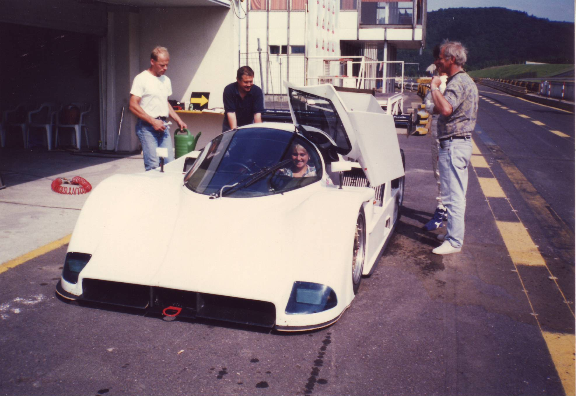 Peter Stürtz stehend im Frühjahr 1986 bei Testfahrten in Most